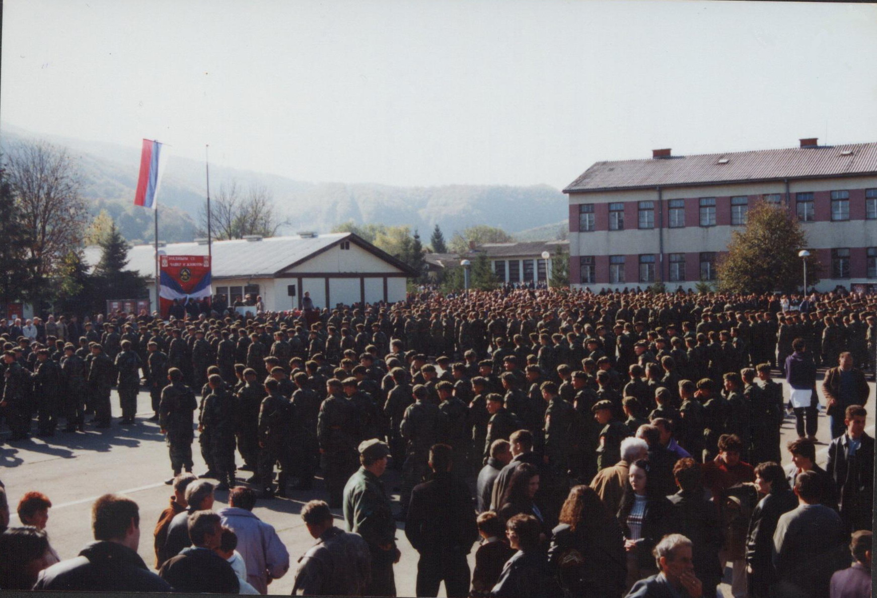 Заклетва војника 2001. године на Војном полигону Мањача